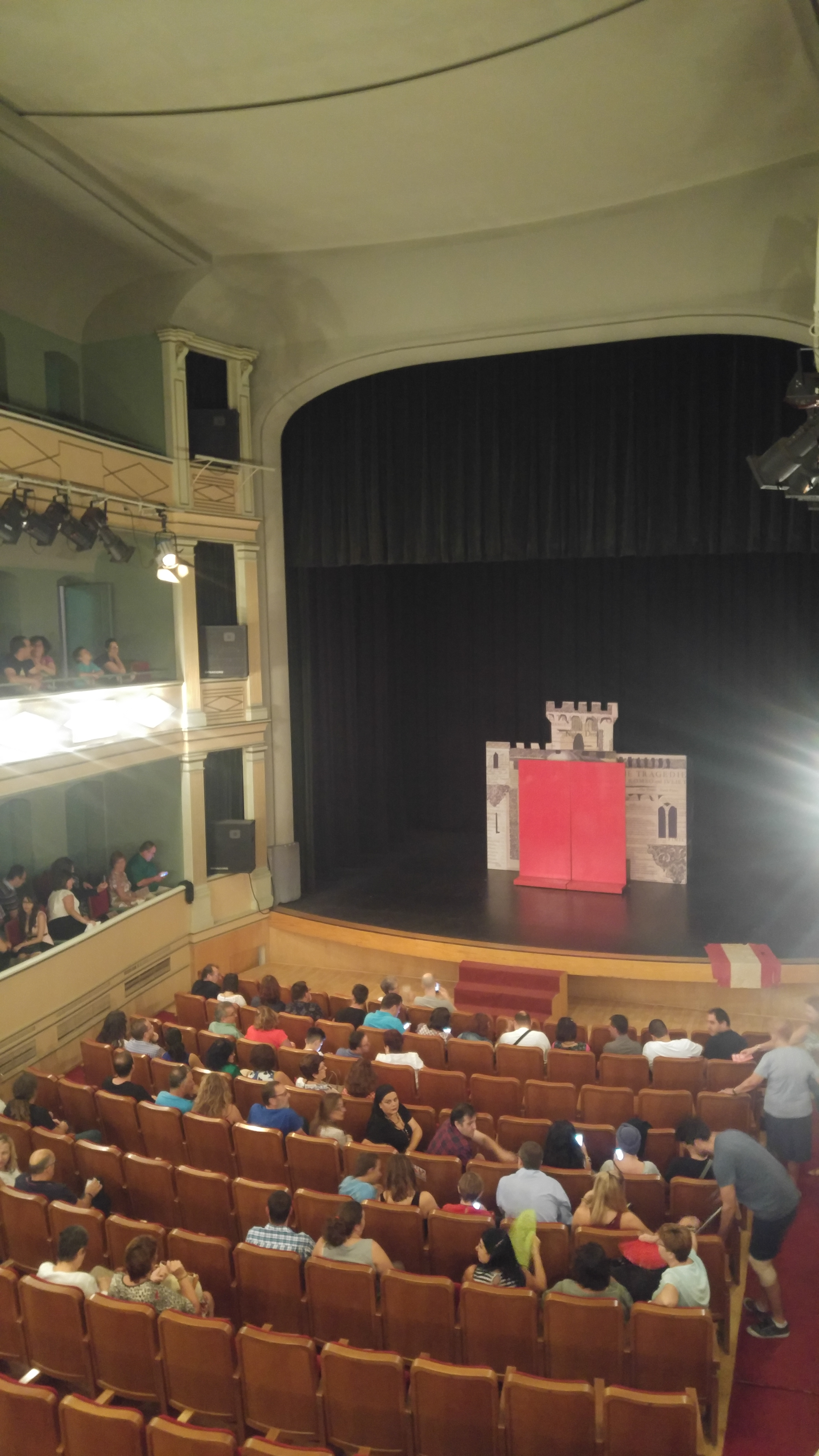 Teatro Principal de Puerto Real, interior